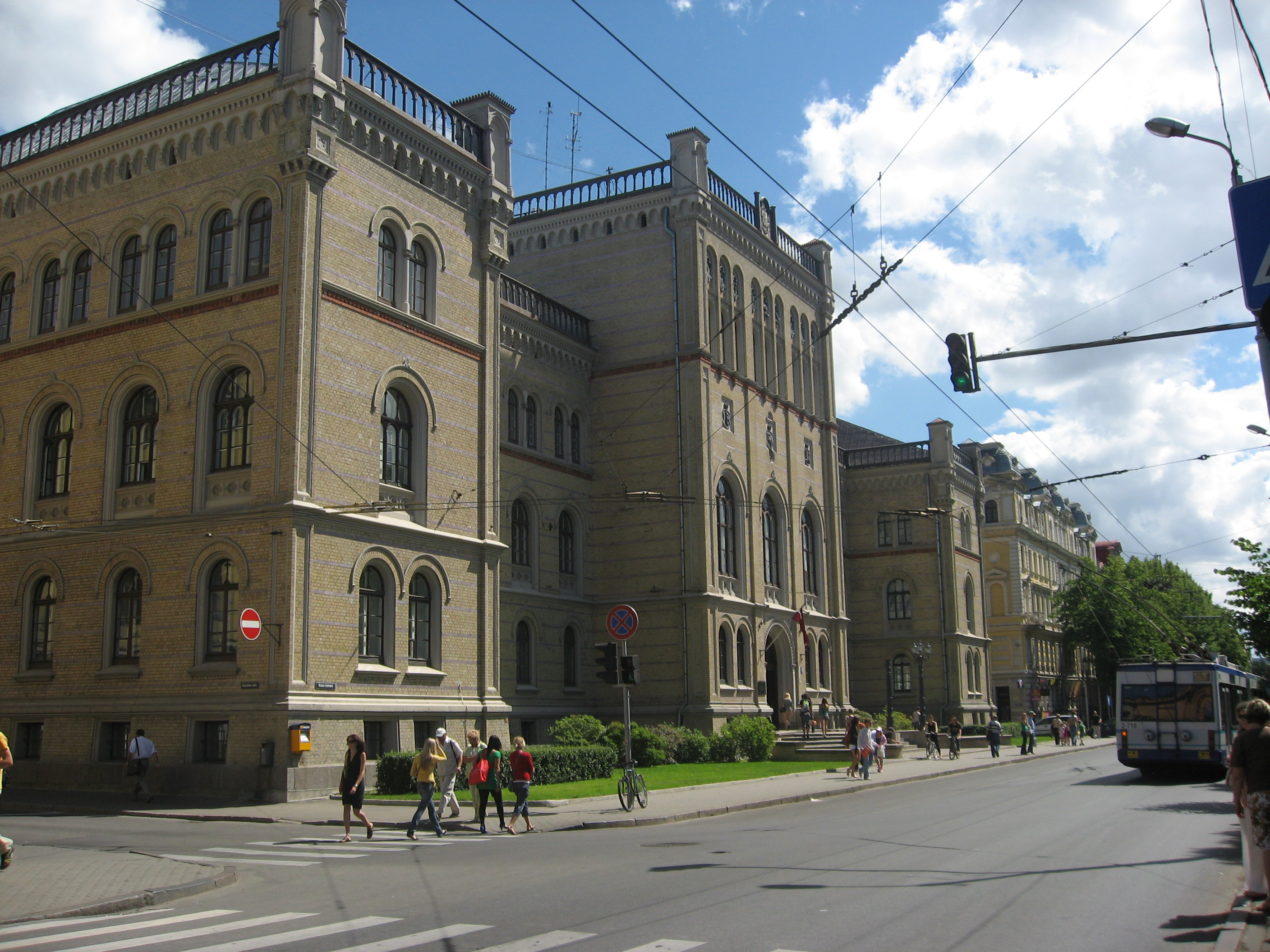 Hlavní budova Lotyšské univerzity